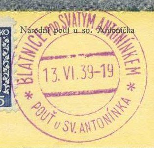 příležitostné razítko pof. PR7 (text "BLATNICE POD SVATÝM ANTONÍNKEM/ POUŤ u SV. ANTONÍNKA") s datem 13. VI. [19]39 – výřez z pohlednice titulované "Národní pouť u sv. Antoníčka" opatřené československou známkou v hodnotě 5 haléřů